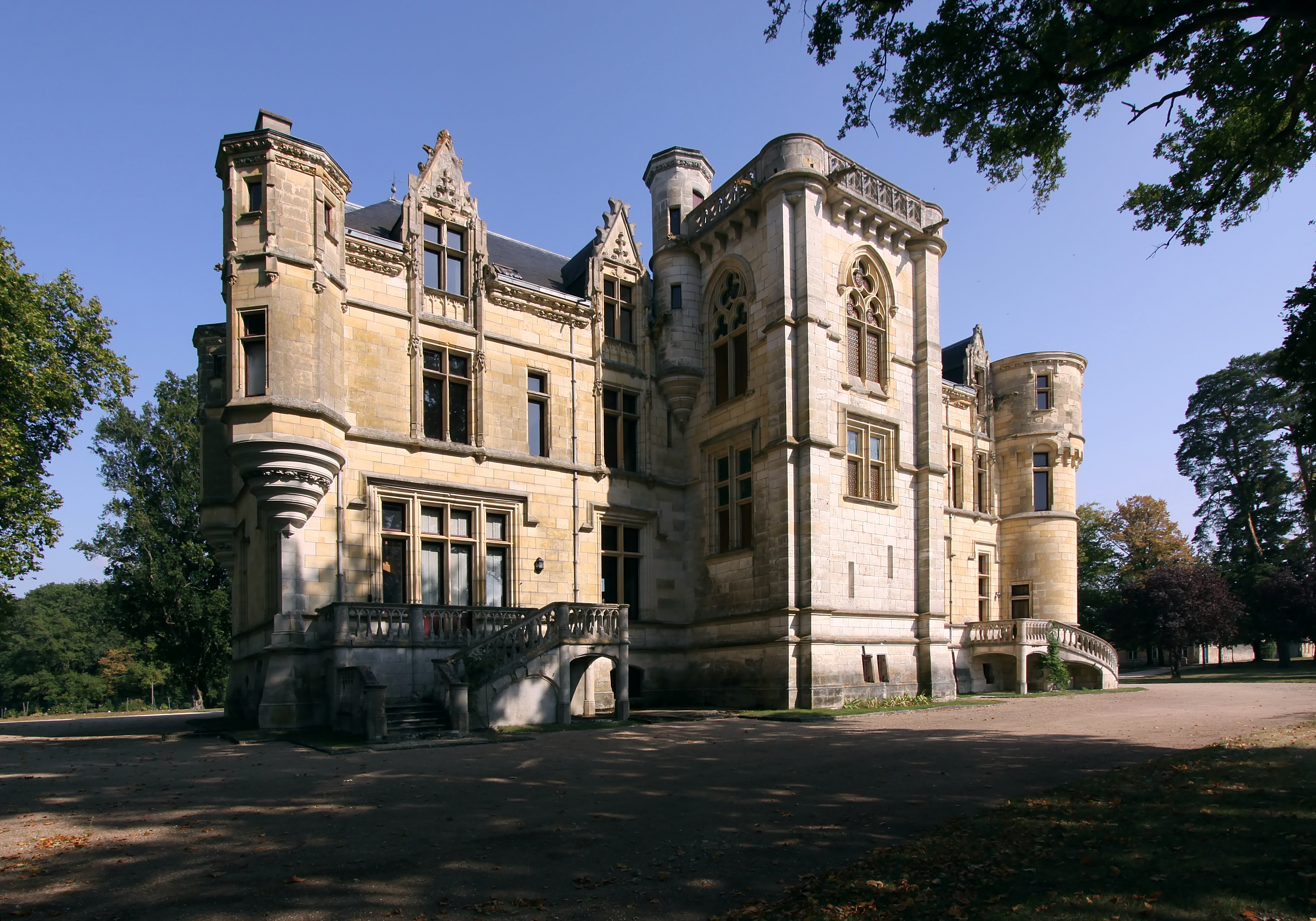 Schloss La Brosse im französischen Département Cher - Neogotisches Bauwerk von 1866